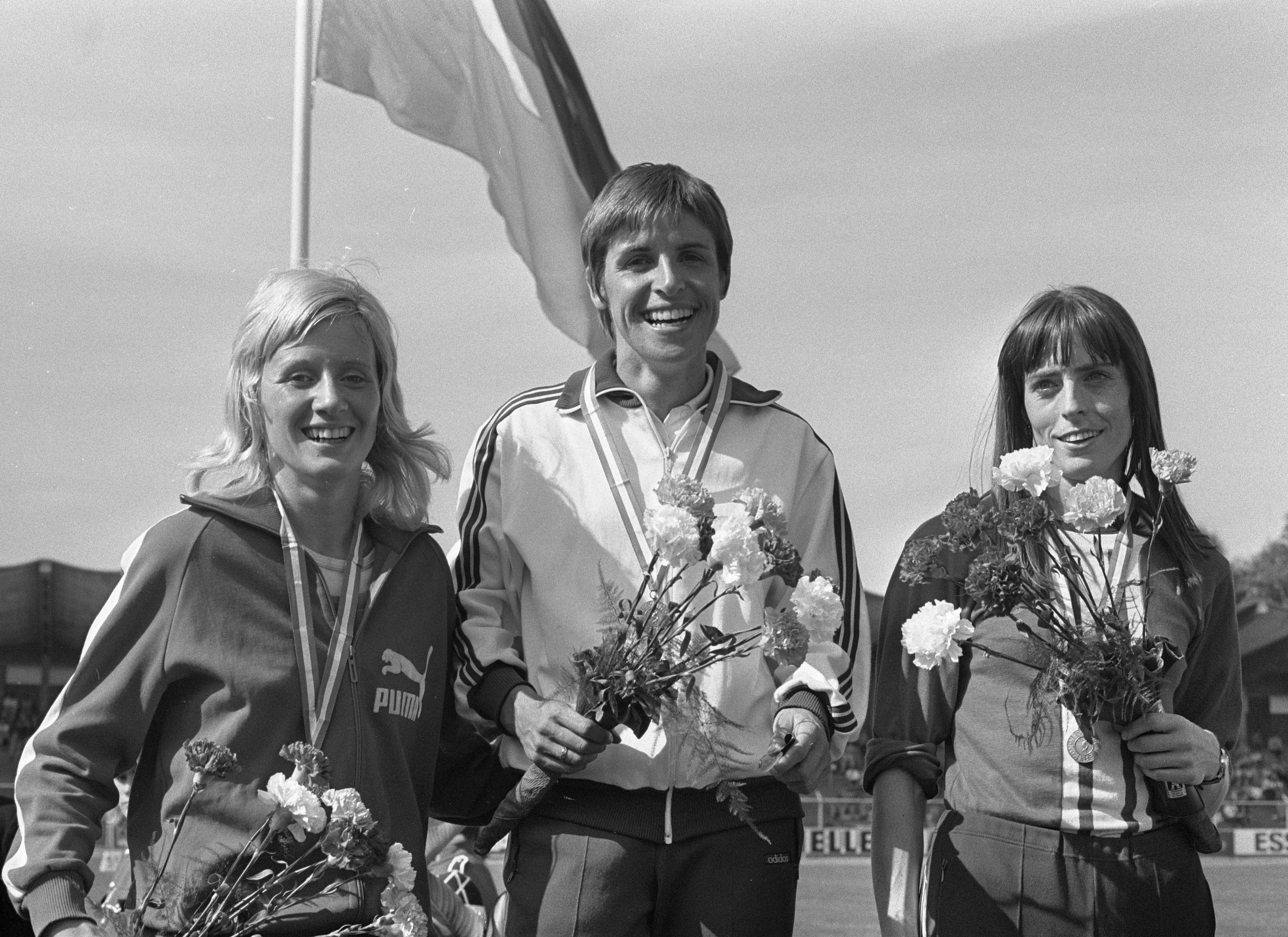 Nationale Atletiekkampioenschappen te Kerkrade, v.l.n.r. Joke van Gerven-Van der Stelt, Ilja Keizer en Berny Boxem-Lenferink